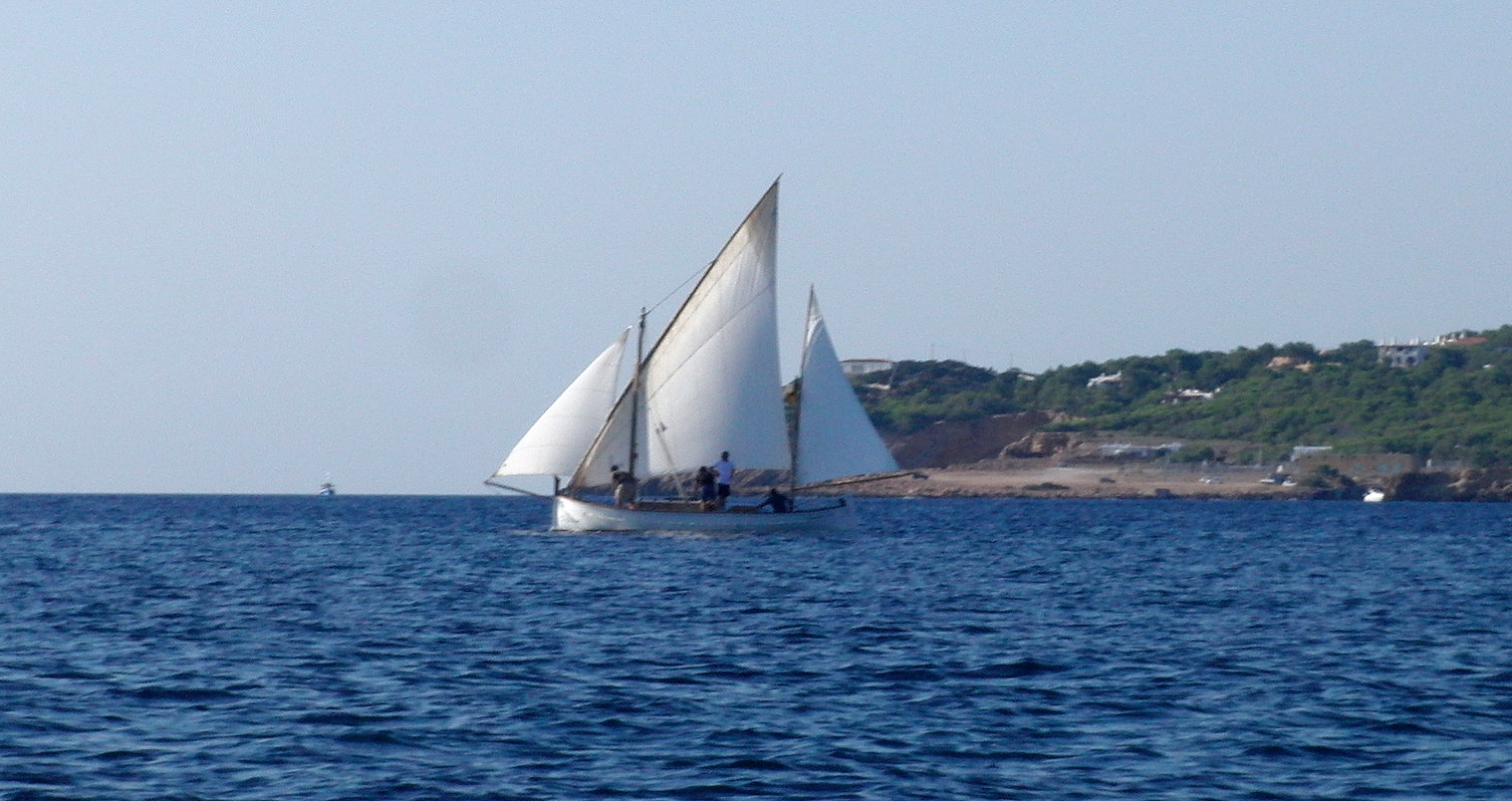 Klassisches Holzboot der Balearen, Llaüt 'Querida Lolita', mit Lateinersegel in der Bucht von Sant Antoni de Portmany vor Ibiza.